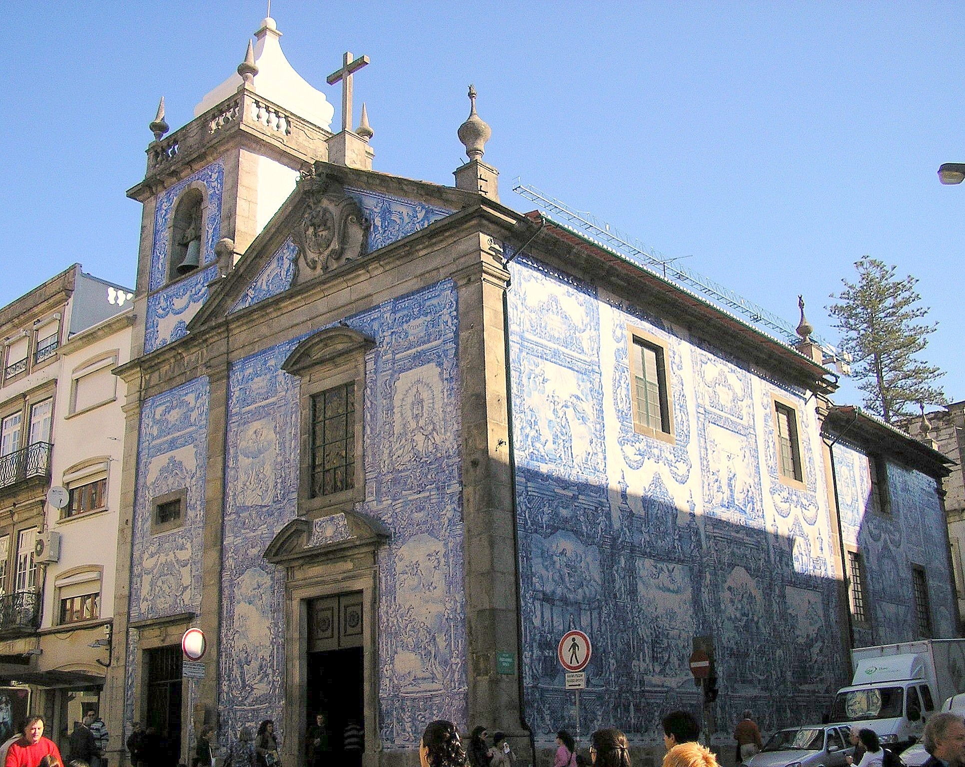 "Almas" chapel in Porto, Portugal